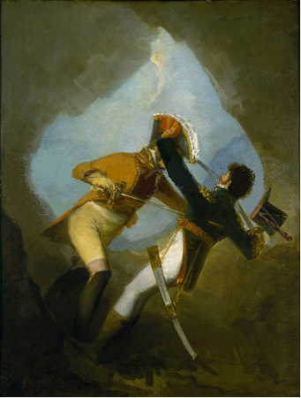 El duelotitle QS:P1476,es:"El duelo" label QS:Les,"El duelo" or